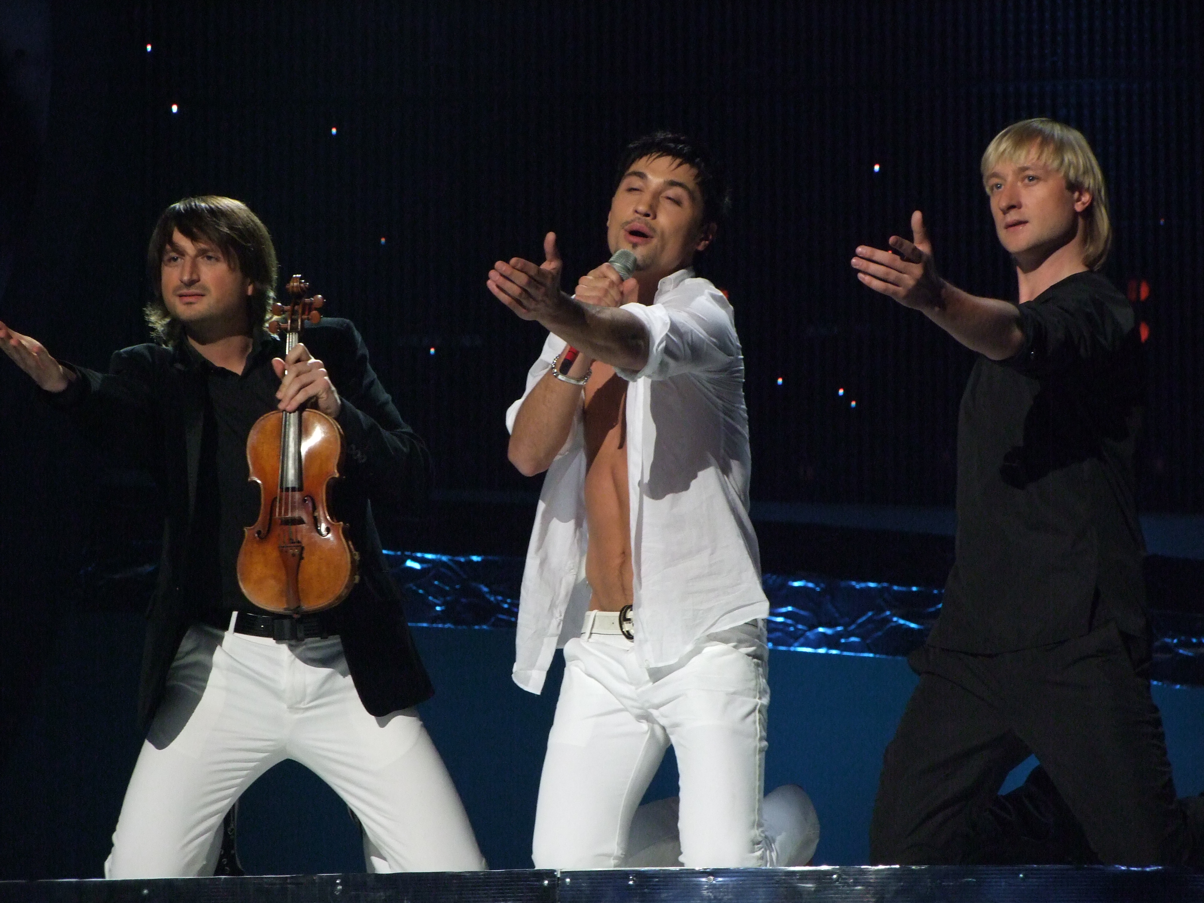 Semifinal 1 EUROVISION 2008